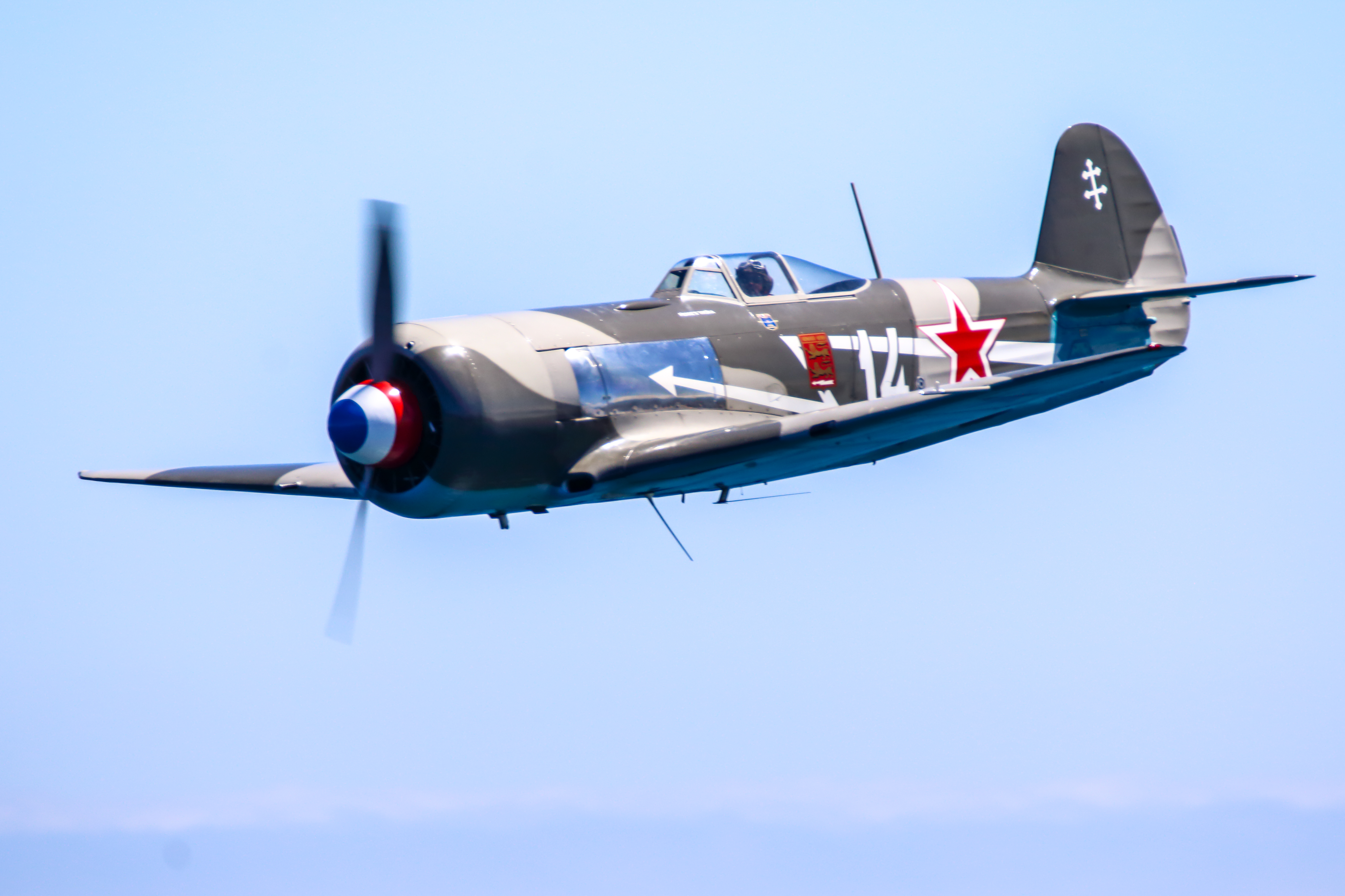 Yak 11. Festival Aéreo Internacional De Gijón. Gijón 2016.